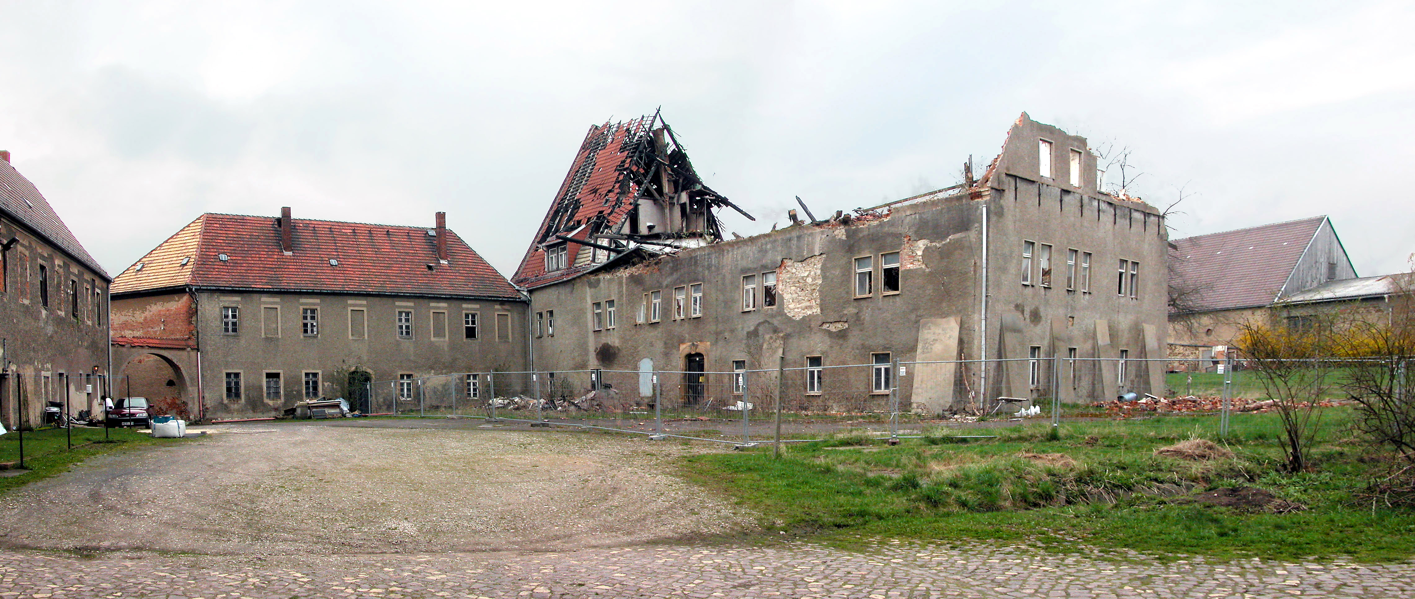 23.04.2006 01683 Deutschenbora (Nossen): Herrenhaus, erbaut in der 2. Hälfte 16. Jh. Die barocke Haustür ließ Philipp August von Mergenthal 1744 einfügen. In der DDR war es Schulhaus. 1997 privatisiert, um eine Wohnanlage zu errichten. Dezember 2001 unter ungeklärten Umständen abgebrannt. [DSCN9629-9630.TIF]20060423185MDR.JPG(c)Blobelt